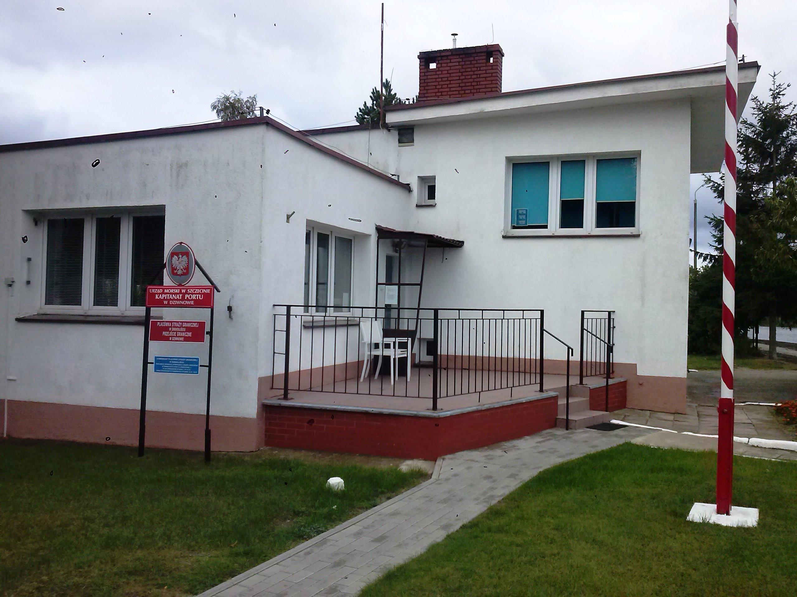 Budynek Straży Granicznej w Dziwnowie